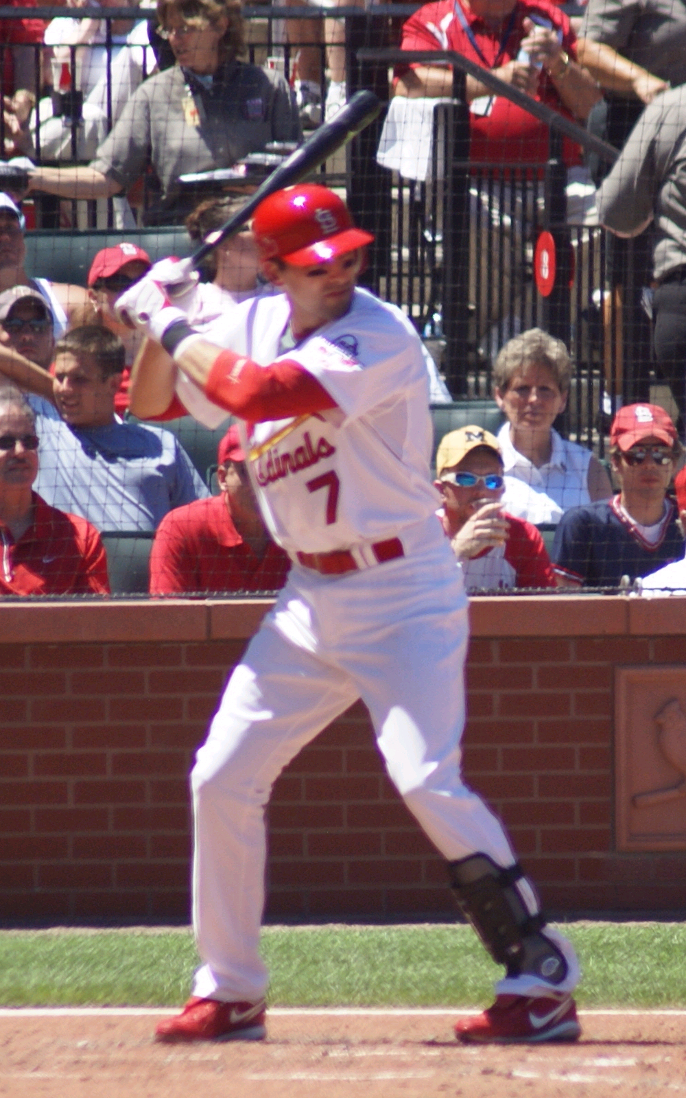 Mark DeRosa